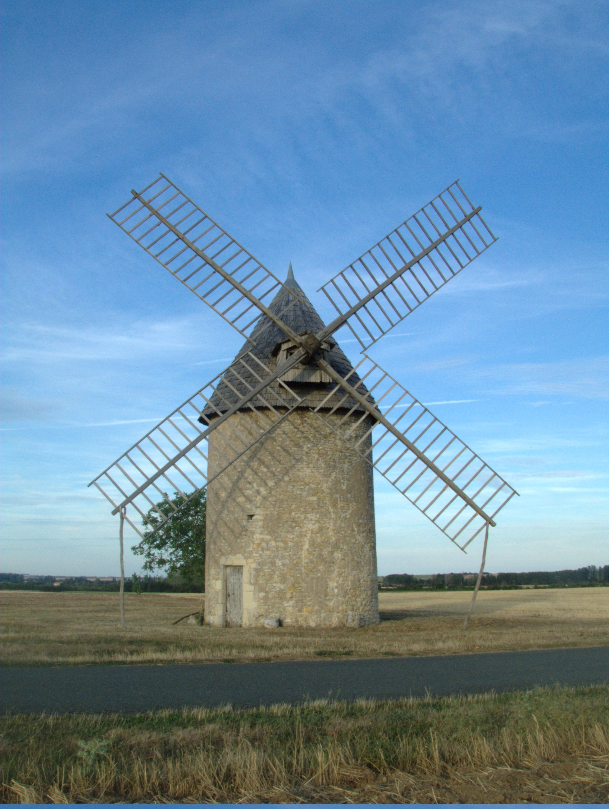 Moulin de Tol (Cherves, France)